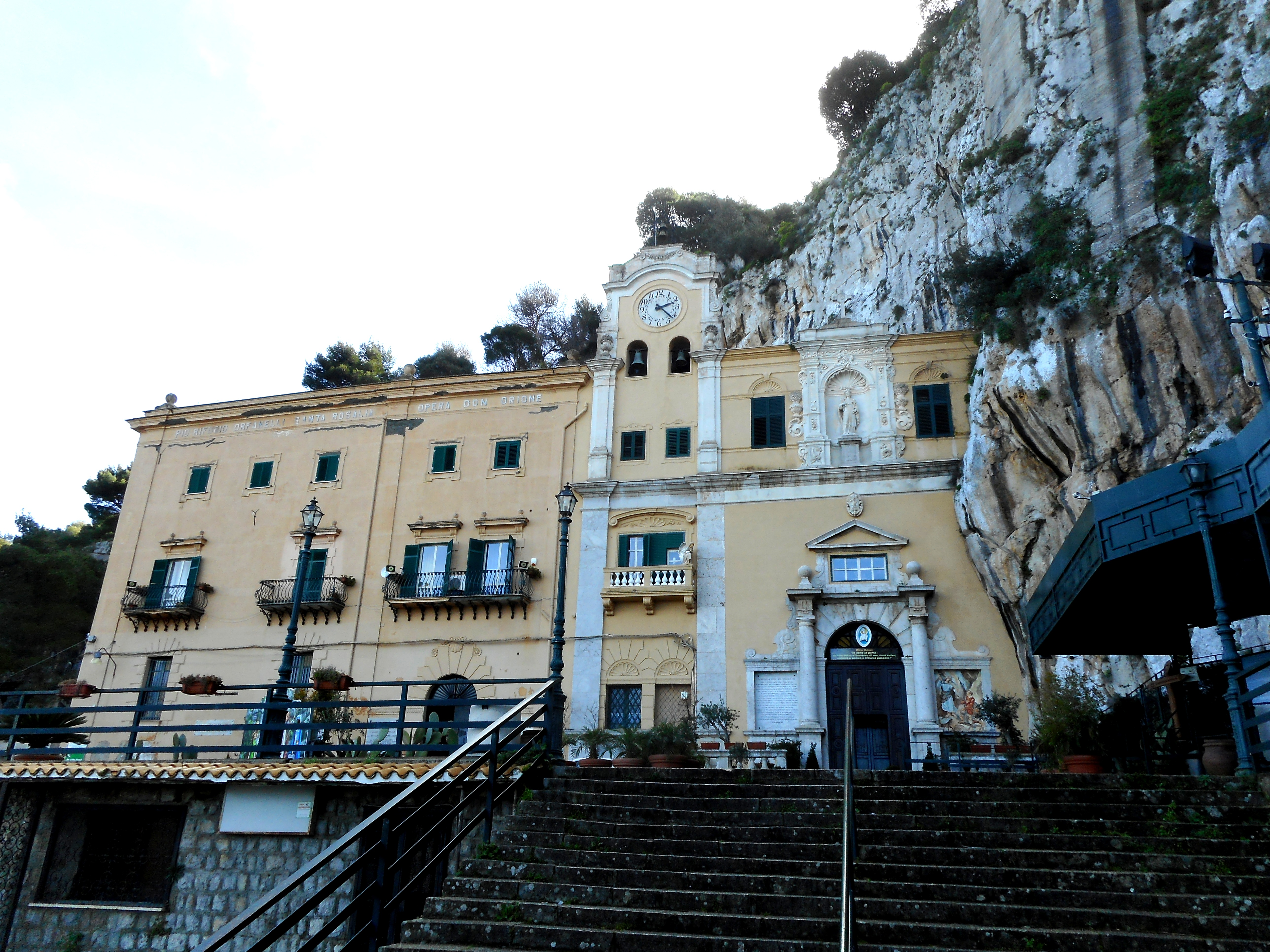 Facciata del Santuario di Santa Rosalia su Monte Pellegrino a Palermo